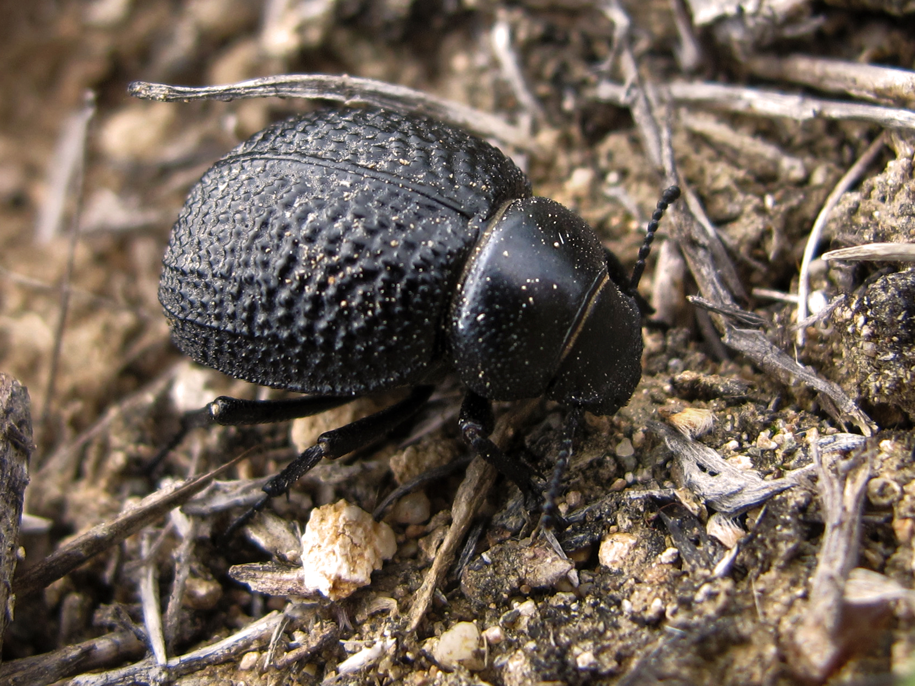 Los tenebriónidos son una de las grandes familias de coleópteros con unas 20.000 especies descritas. Son predominentemente de coloraciones oscuras, de donde deriva su nombre. Básicamente detritívoros y son especialmente diversos en ambientes esteparios y desérticos.